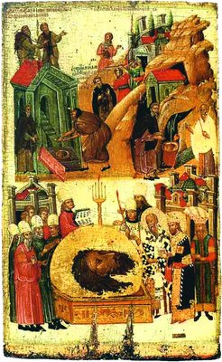 Три обретения честной главы св. Иоанна Предтечи. Икона. XIV в. (Великая Лавра на Афоне)